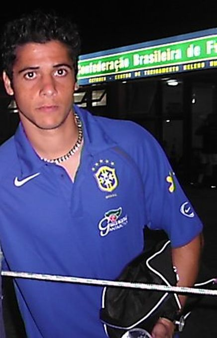 Cicinho, EL AMIGO DE LAS MUJERES